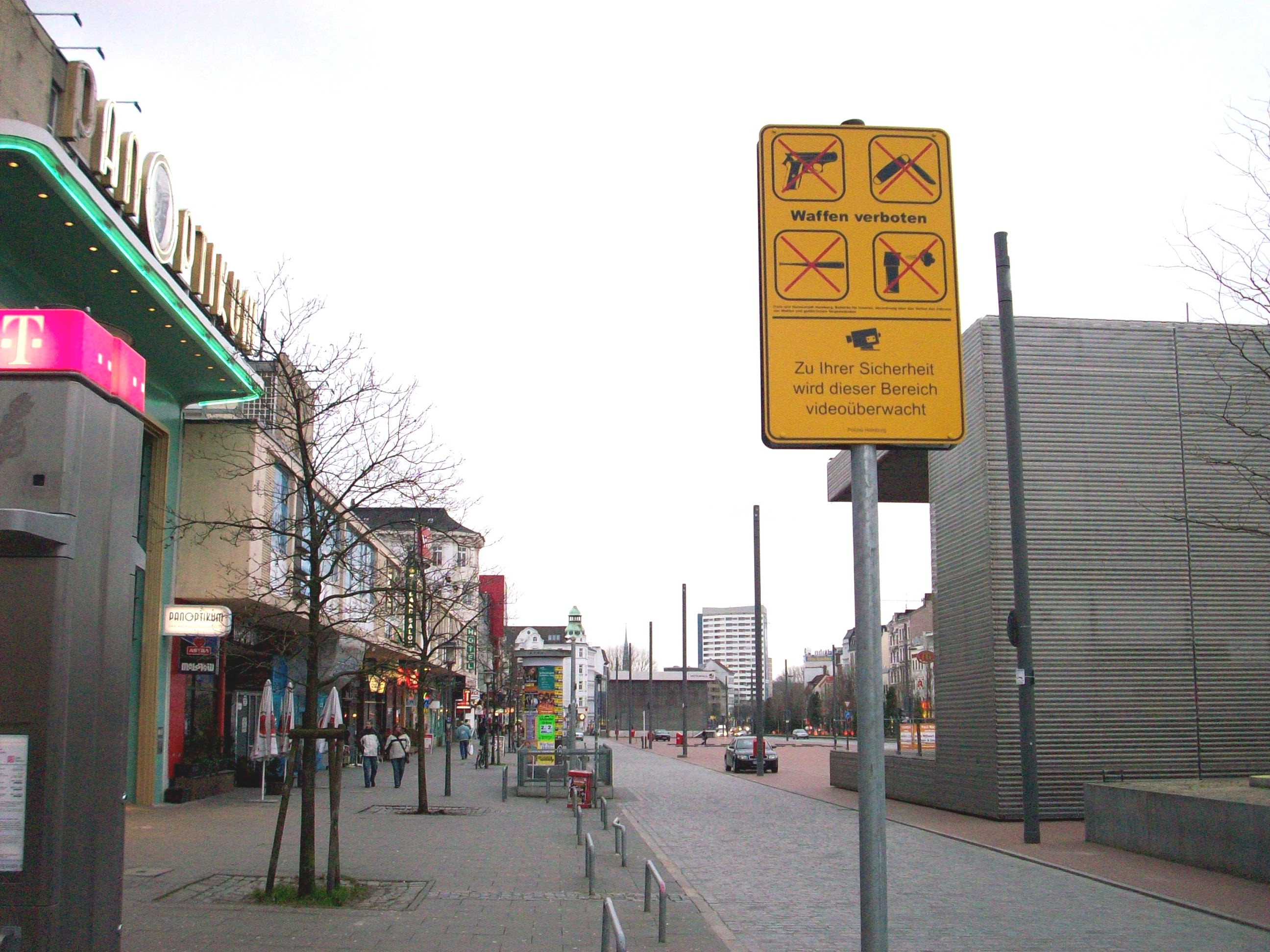 Kennzeichnung des (Waffenverbotsgebiets Reeperbahn) und der Videoüberwachung am Spielbudenplatz in Hamburg-St. Pauli.